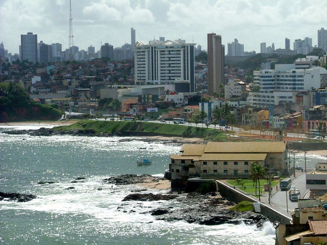 Salvador, BrazilSalvador